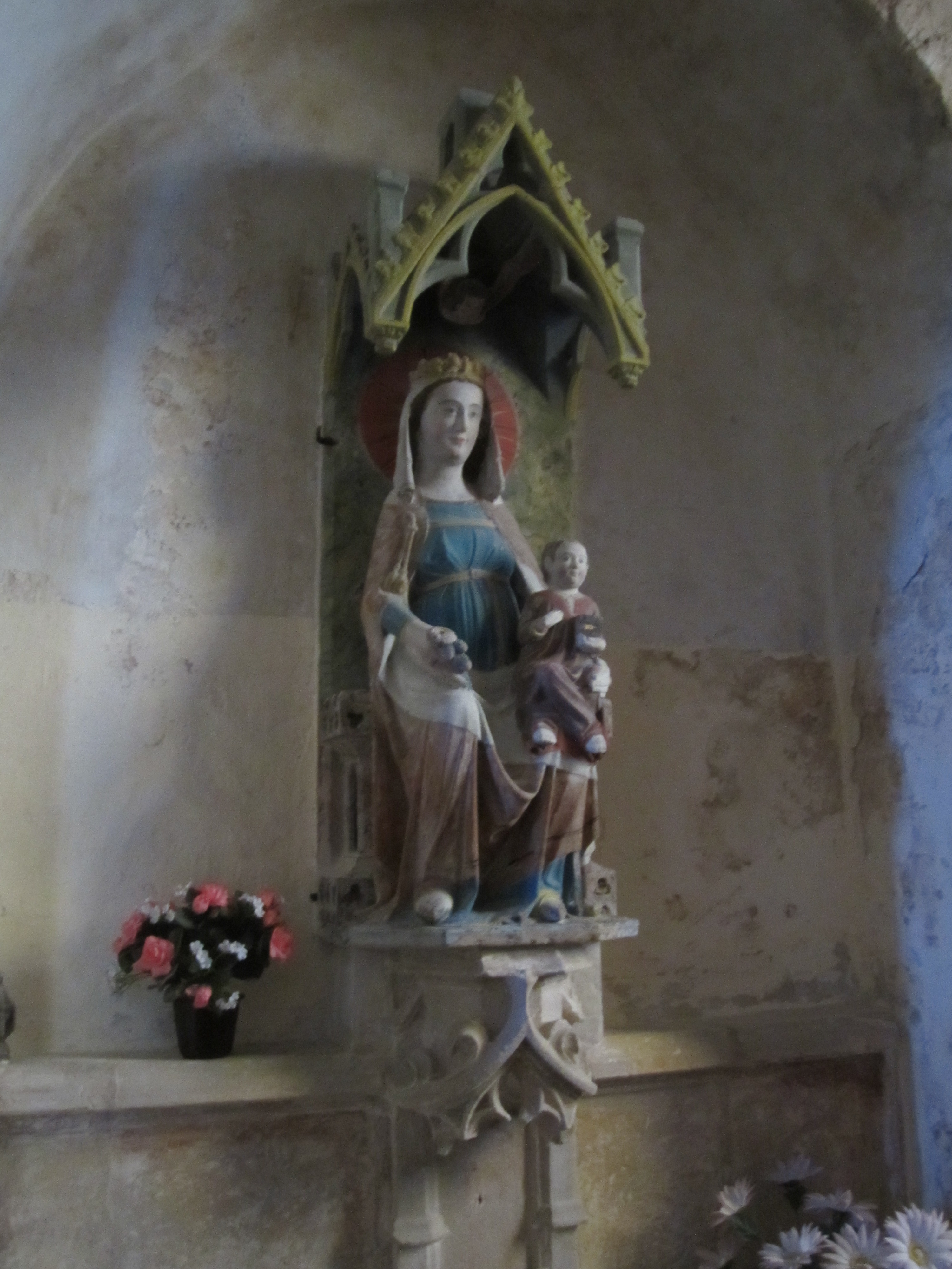 Foucarville, Manche; la vierge et l'autel-retable-niche du XVe sont classés M.H..